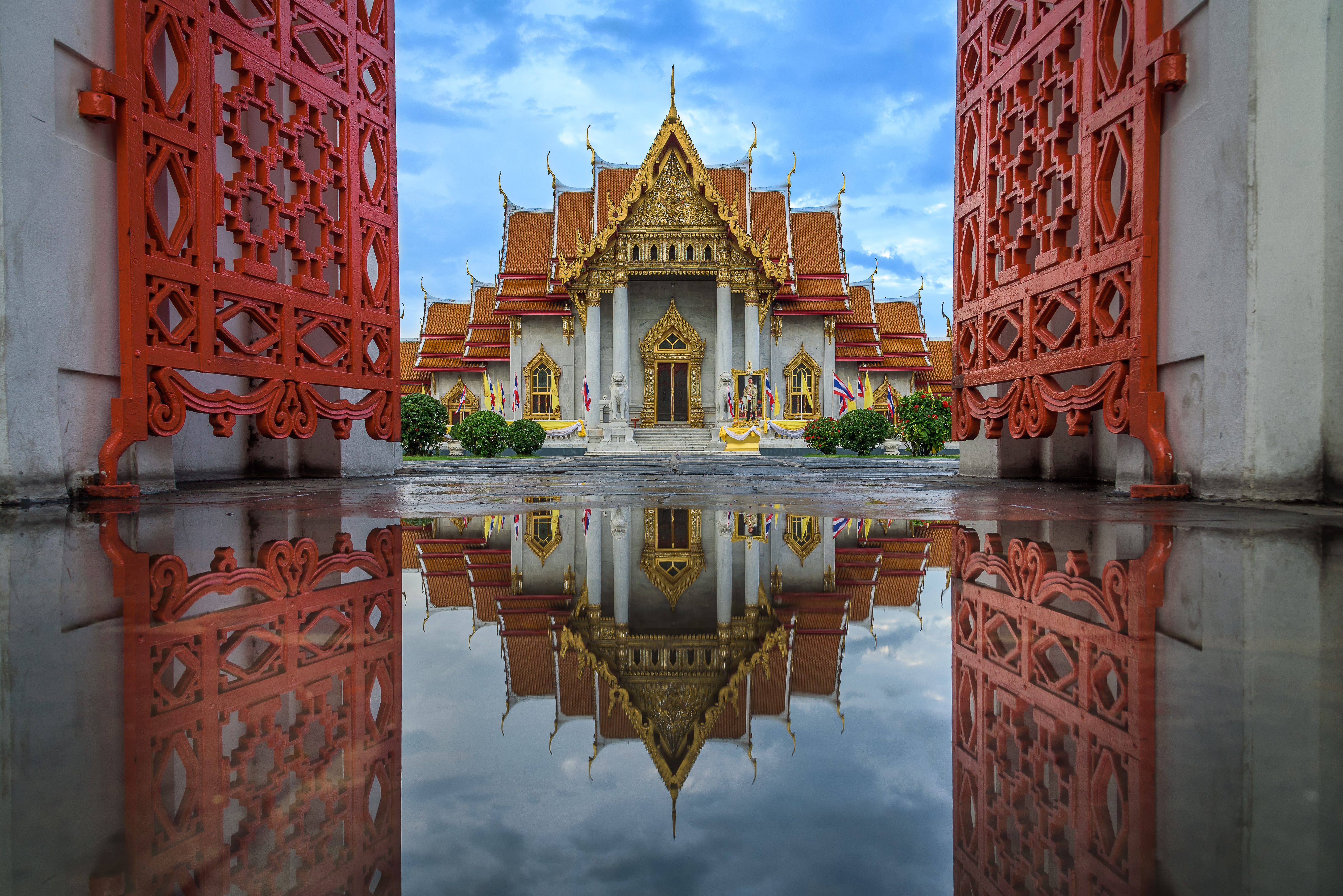 ภาพเงาสะท้อนน้ำของวัดเบญจมบพิตรดุสิตวนารามหลังพายุสงบ ทำให้เห็นความงามของวัดในอีกมุมมองหนึ่ง